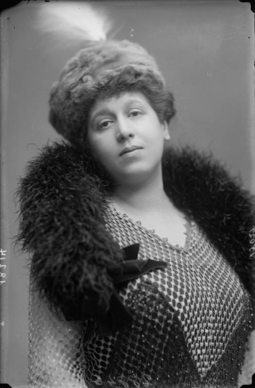 Soprano Rina Giachetti fotografata da Mario Nunes Vais